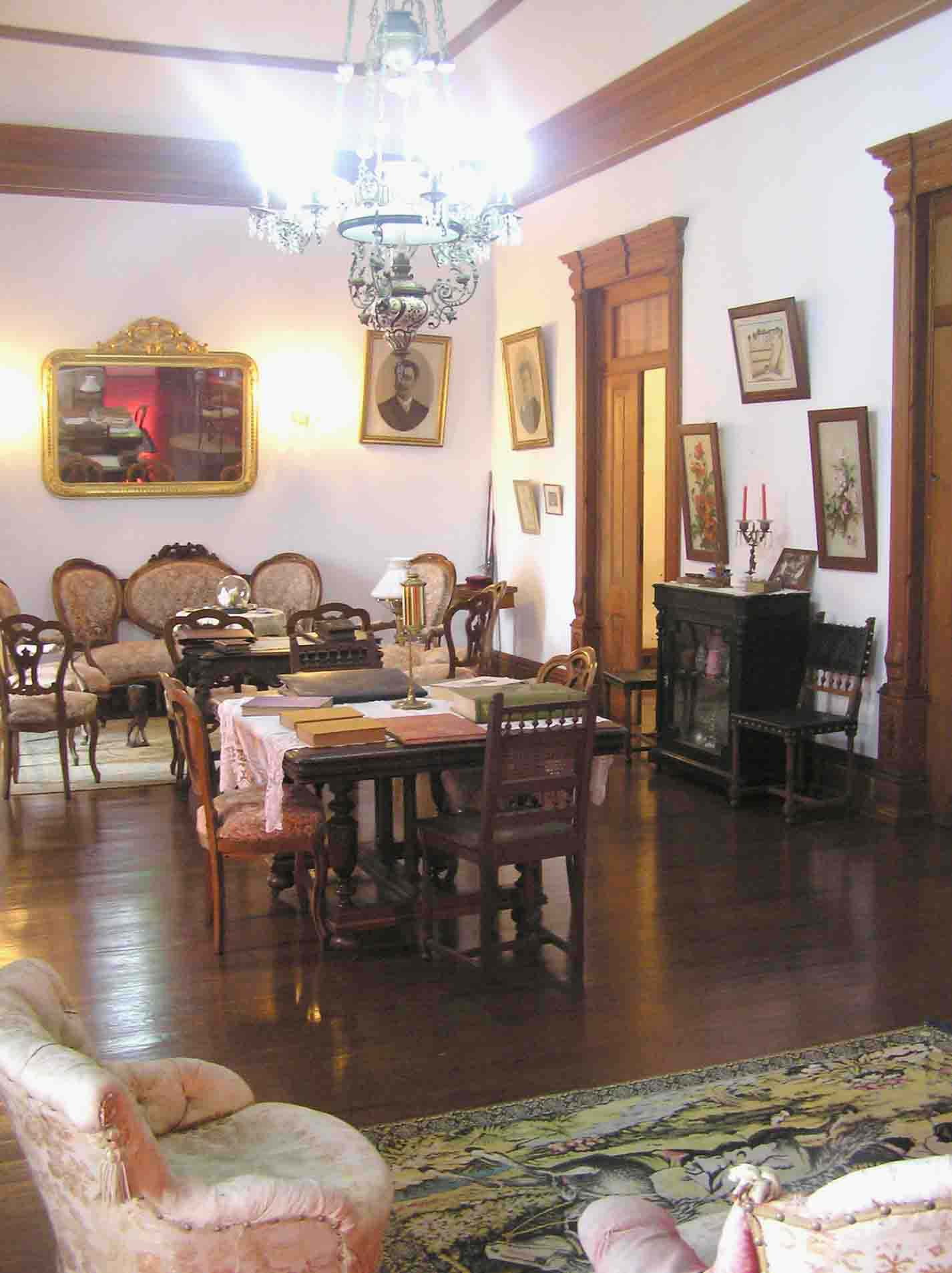 Villa Maria, Salão Nobre, Angra do Heroísmo, ilha Terceira, Açores, Portugal.